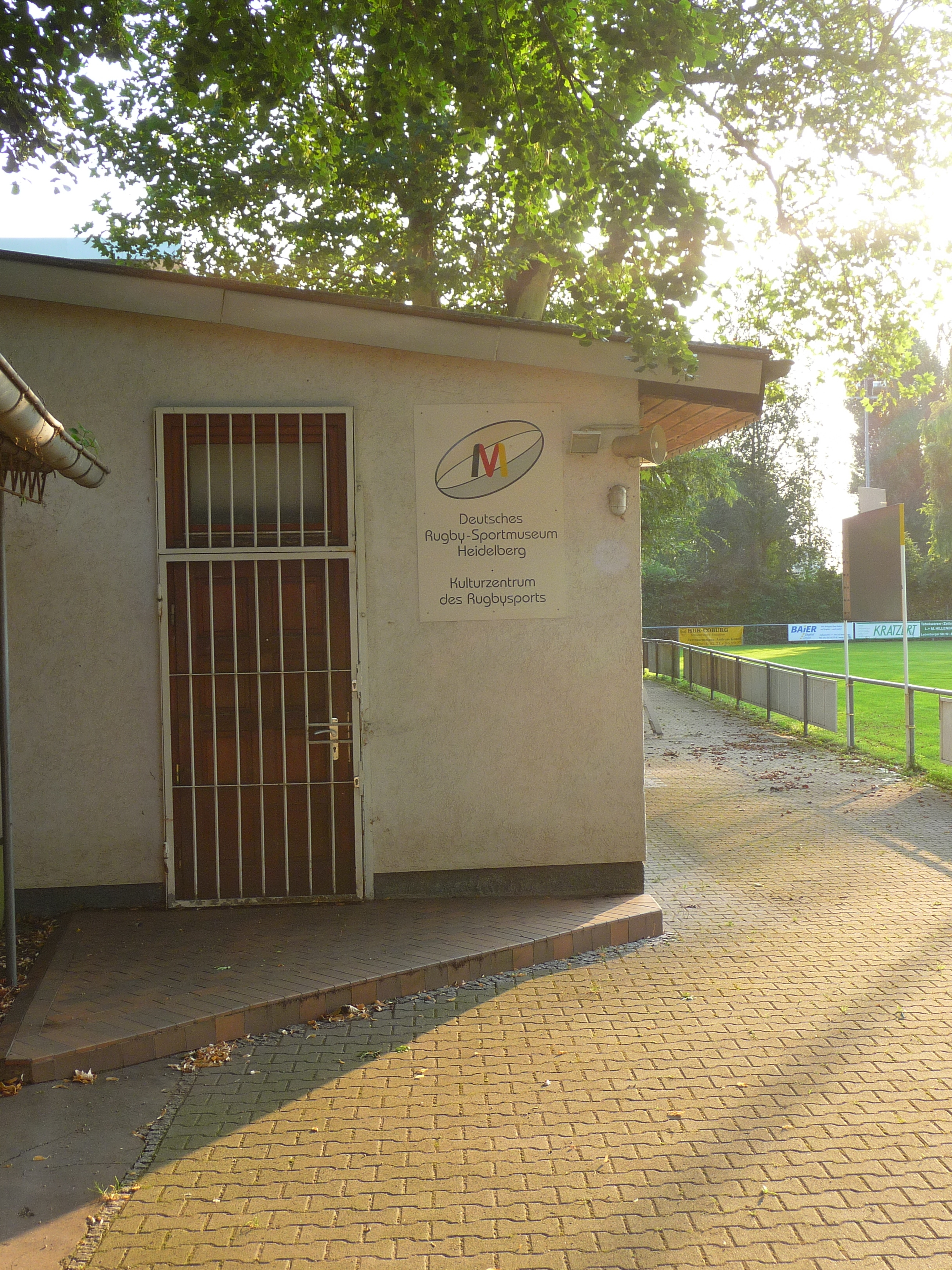 Deutsches Rugby-Sportmuseum Heidelberg